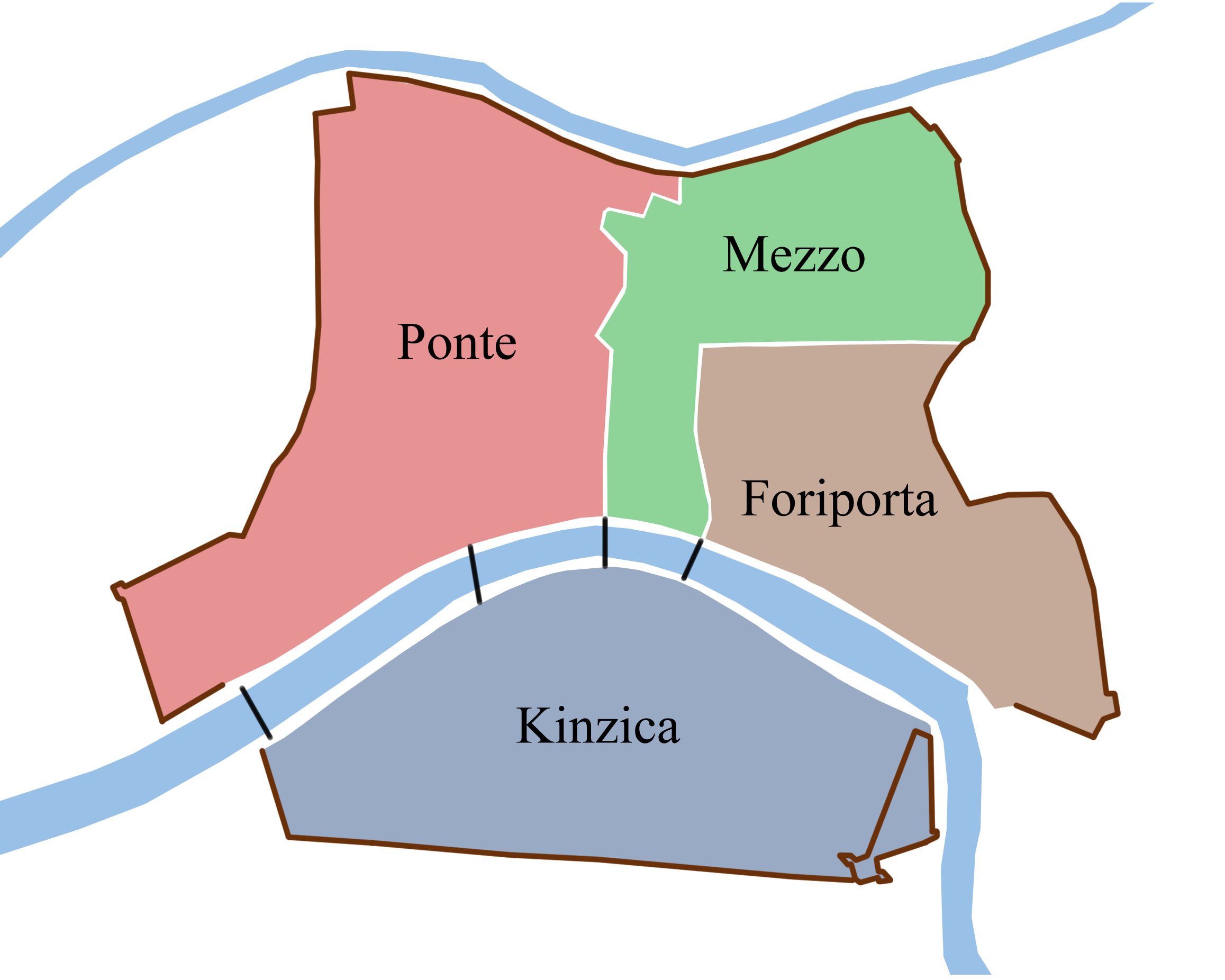 I quartieri storici della Repubblica di Pisa